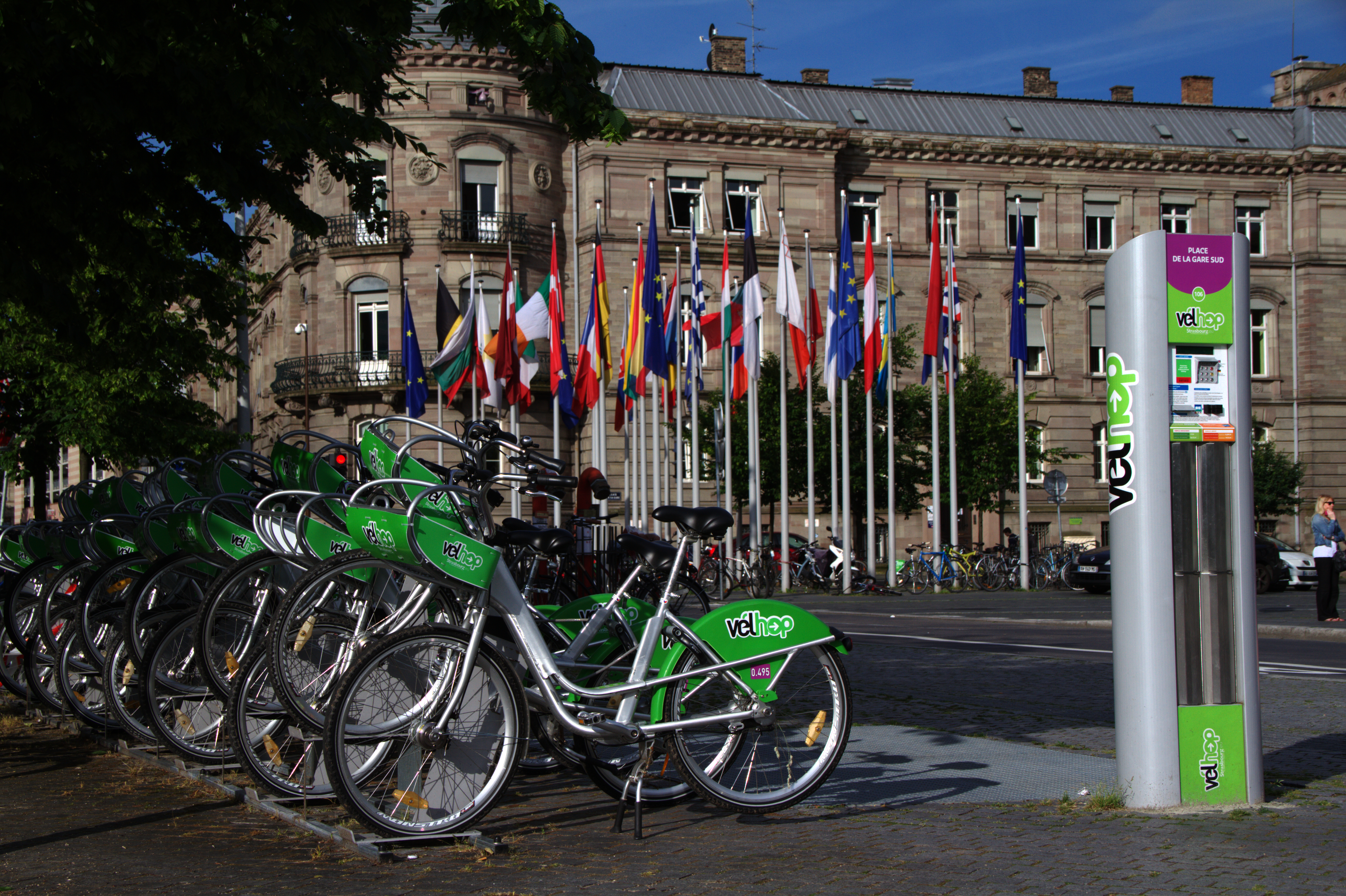 Strasbourg place de la Gare station automatique Vélhop